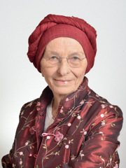 Ritratto Emma Bonino